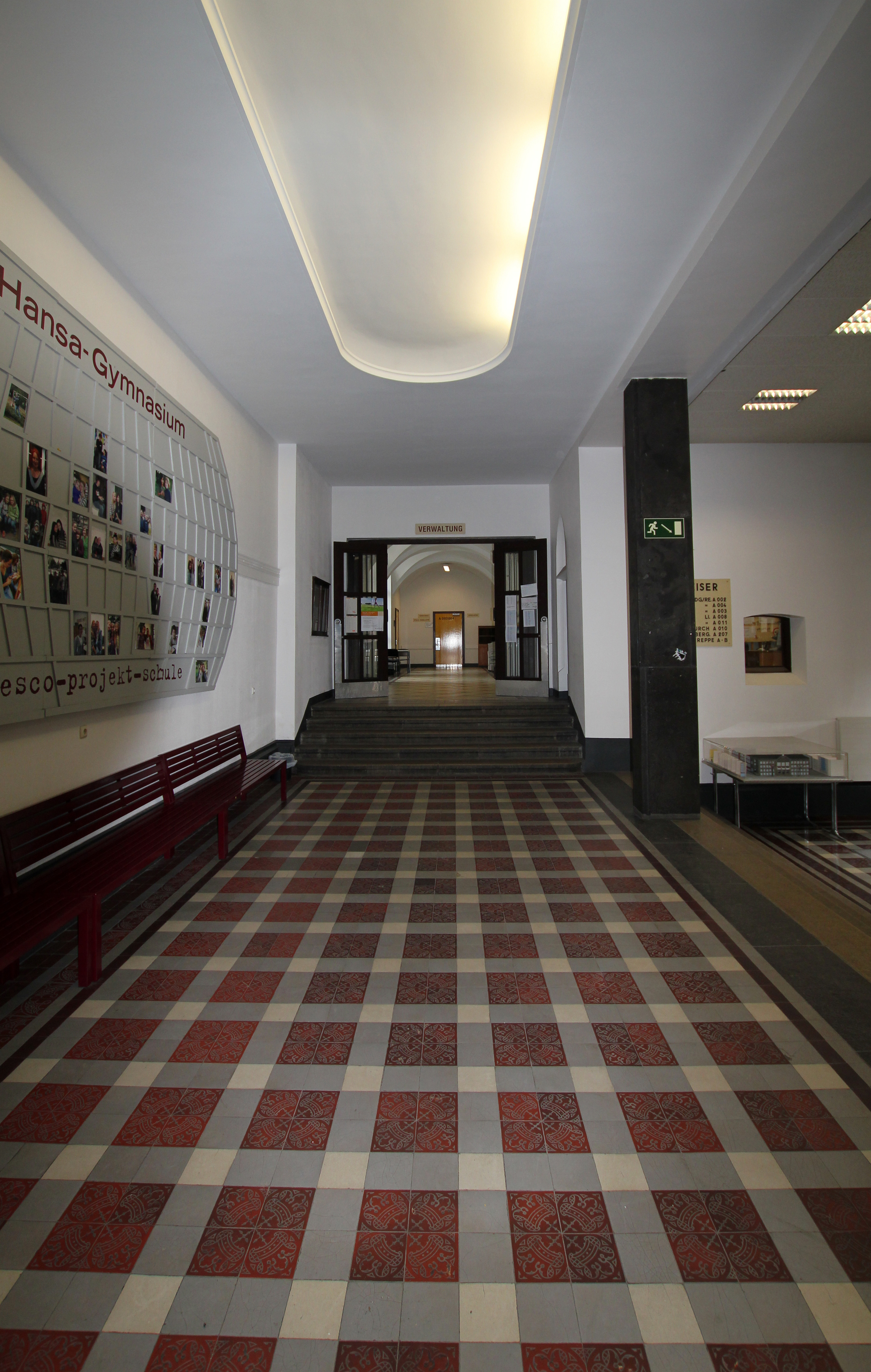 Köln-Neustadt-Nord, Hansagymnasium Hansaring 54-58 This is a photograph of an architectural monument.